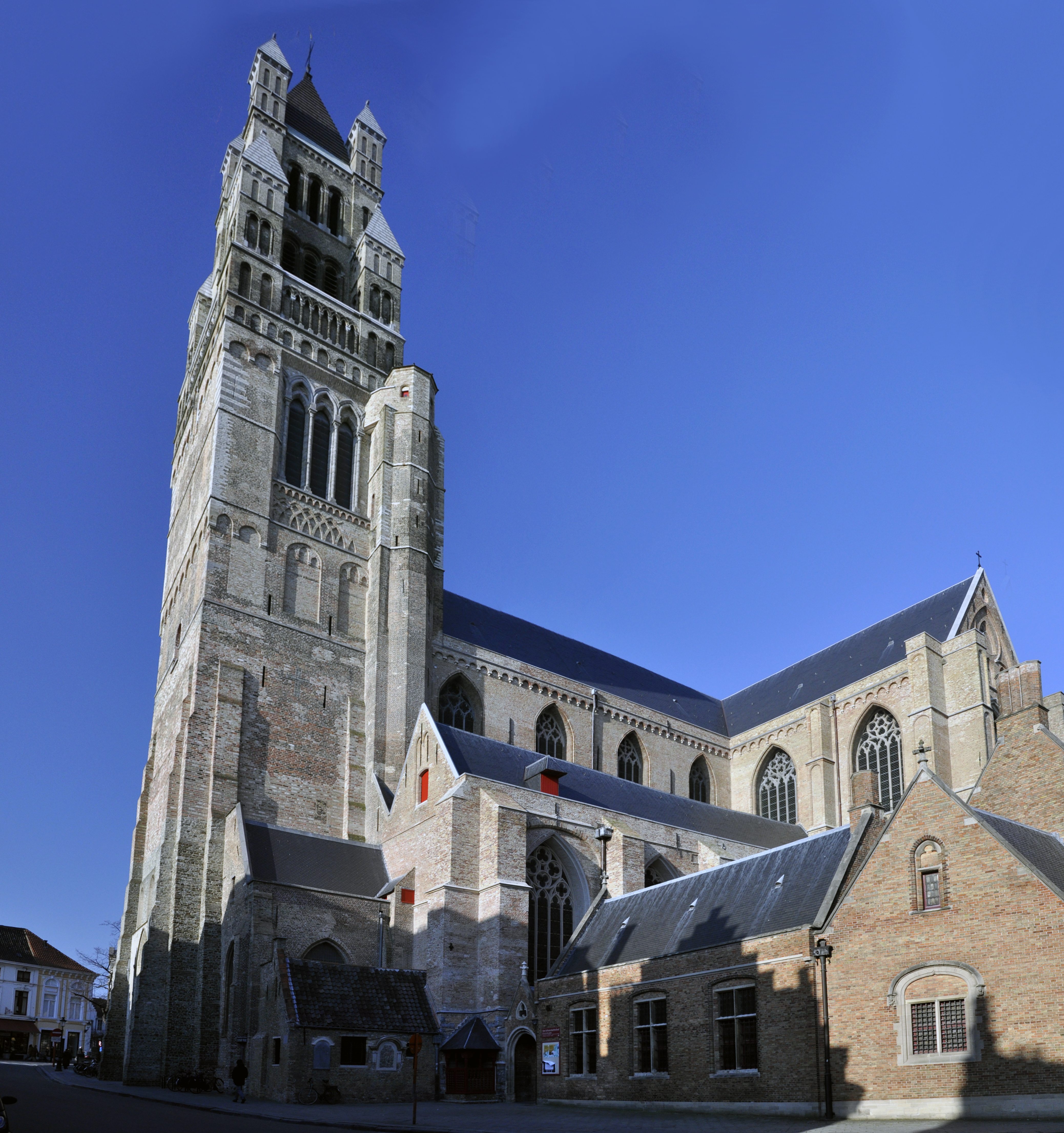 de Sint-Salvatorskathedraal te Brugge